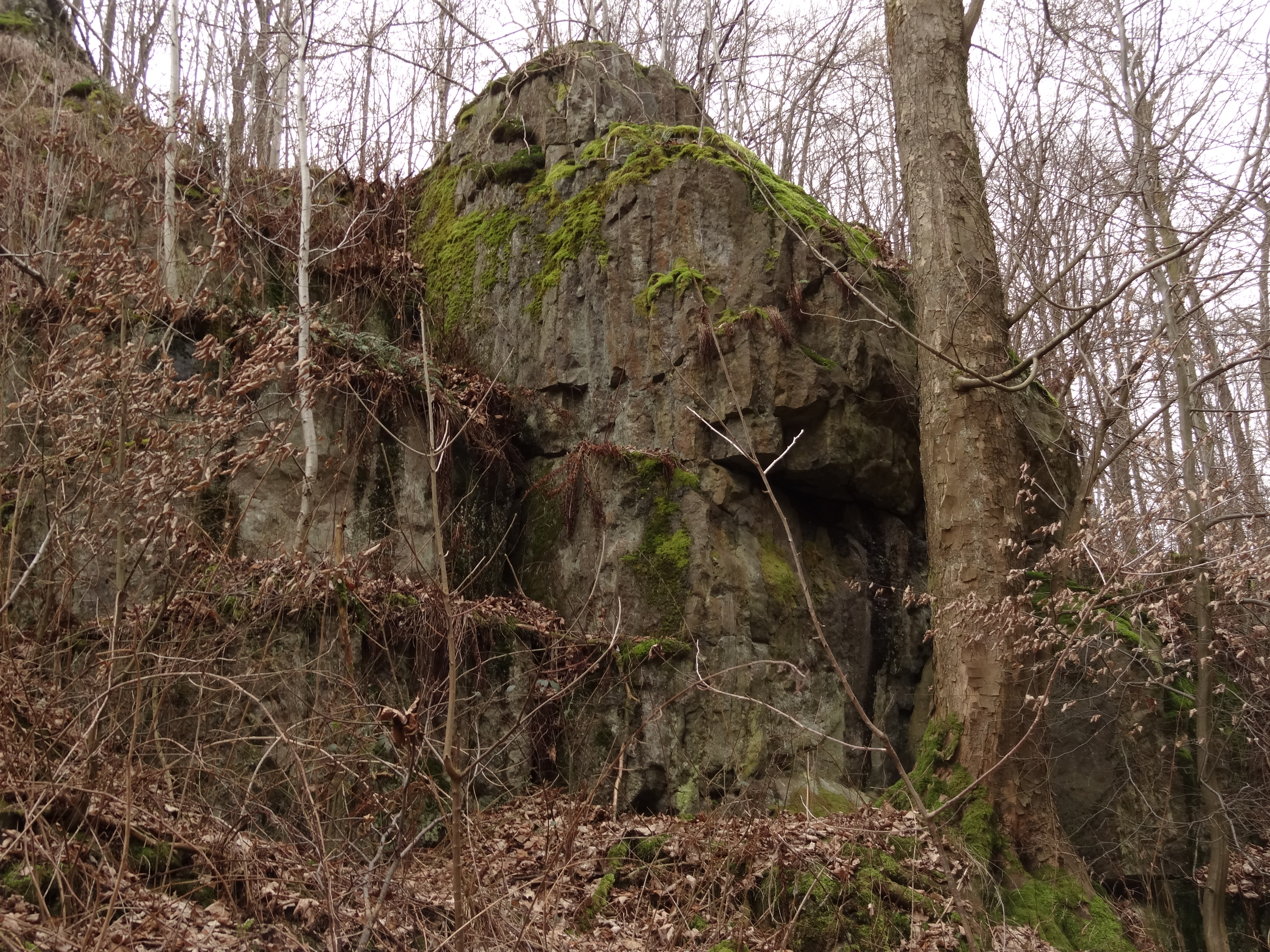 PP Hadí kopec leží na území přírodního parku Peklo mezi Krásným Lesem a Raspenavou v okrese Liberec. Předmětem ochrany je geomorfologicky výrazný masiv čedičového tělesa rozděleného tokem Lomnice s ukázkami sloupcové odlučnosti a fragmenty lesního porostu charakteru submontánního listnatého háje s lokálně vzácnými teplomilnými bylinnými prvky.